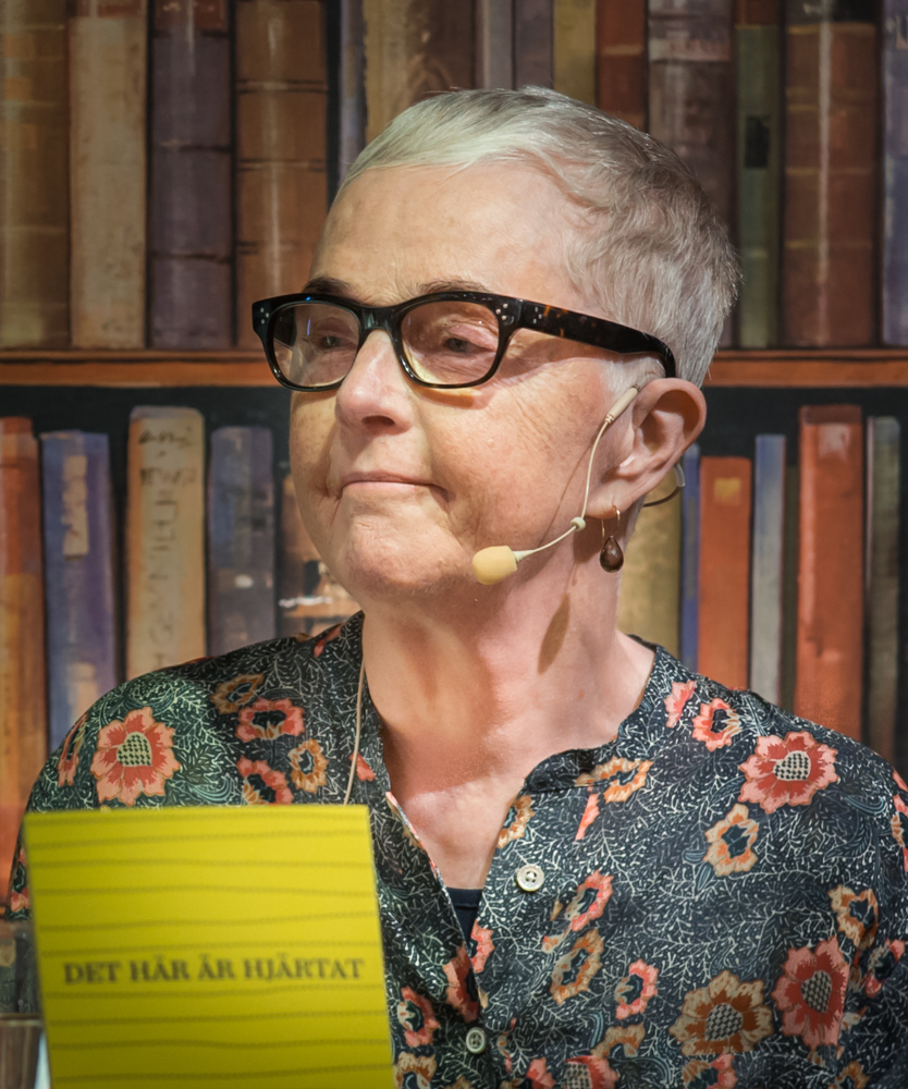 Bodil Malmsten på Akademibokhandeln, Mäster Samuelsgatan, i Stockholm och samtalar om sin senaste bok "Det här är hjärtat", den 19 september 2015.